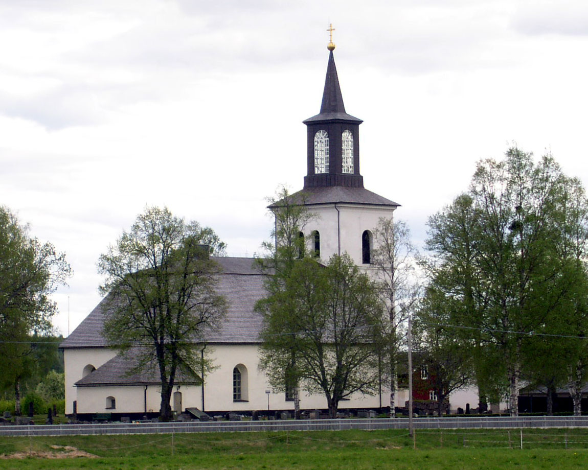 Floda kyrka (Dalarna). Bild tagen från norr